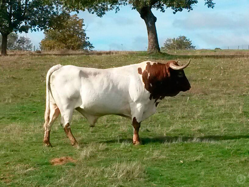 Ejemplar de semental de la raza autóctona española Berrendo en colorado. Fotografía tomada en la Dehesa de Valdelazarza (Salamanca)